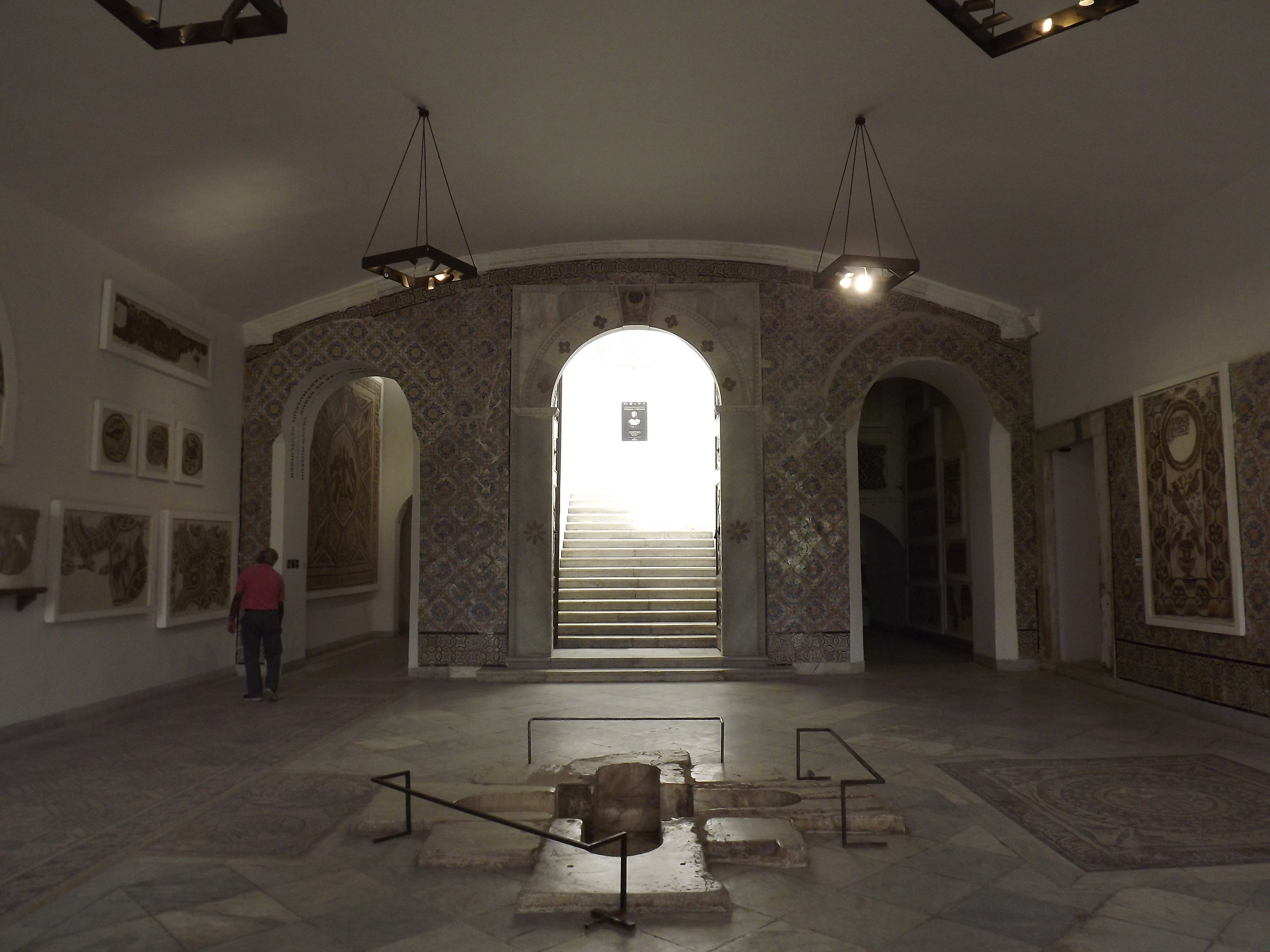 Musée du Bardo à Tunis